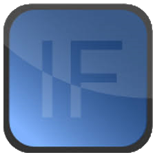 Das Logo von InstallForge.